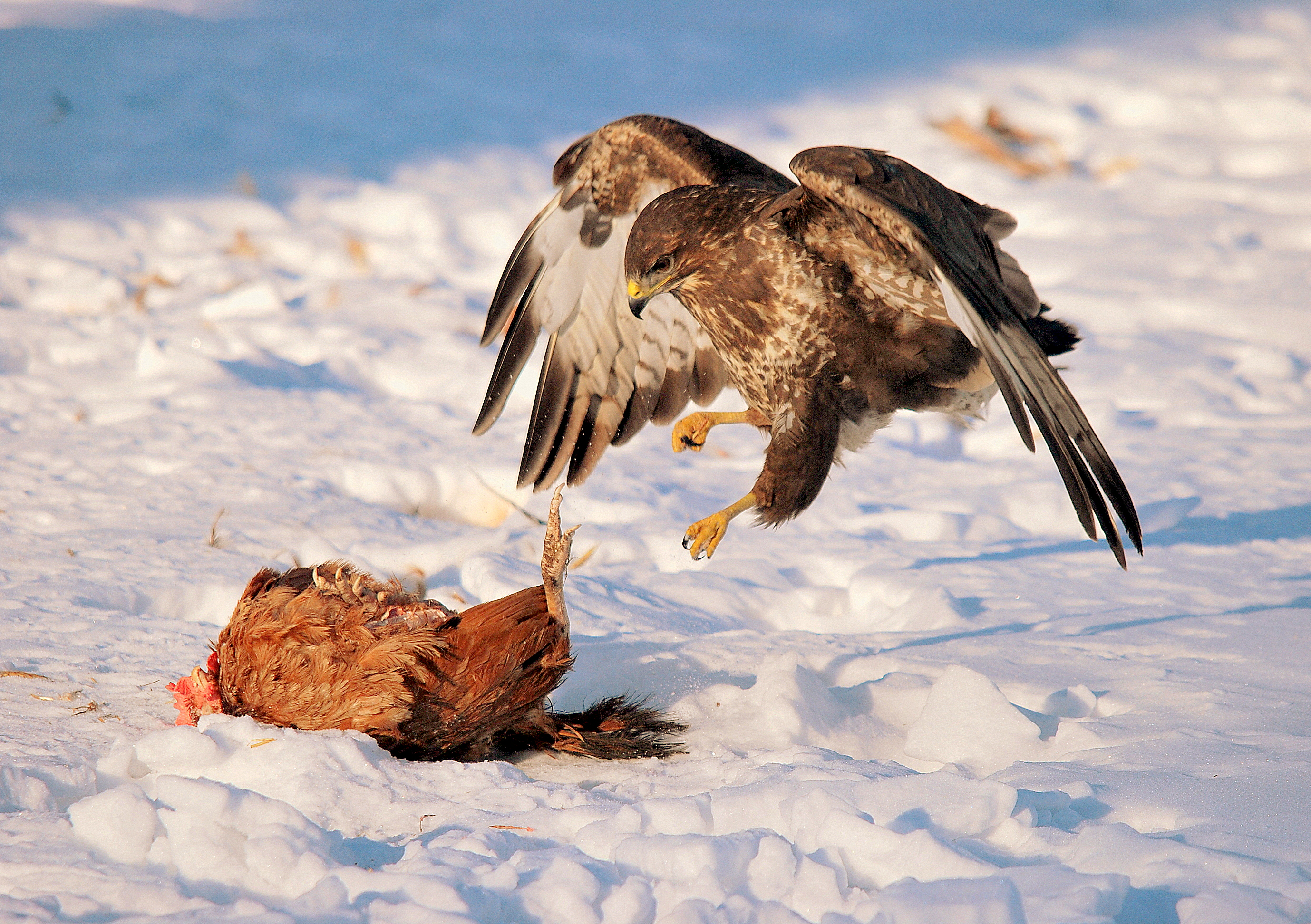 Myszołów Zwyczajny